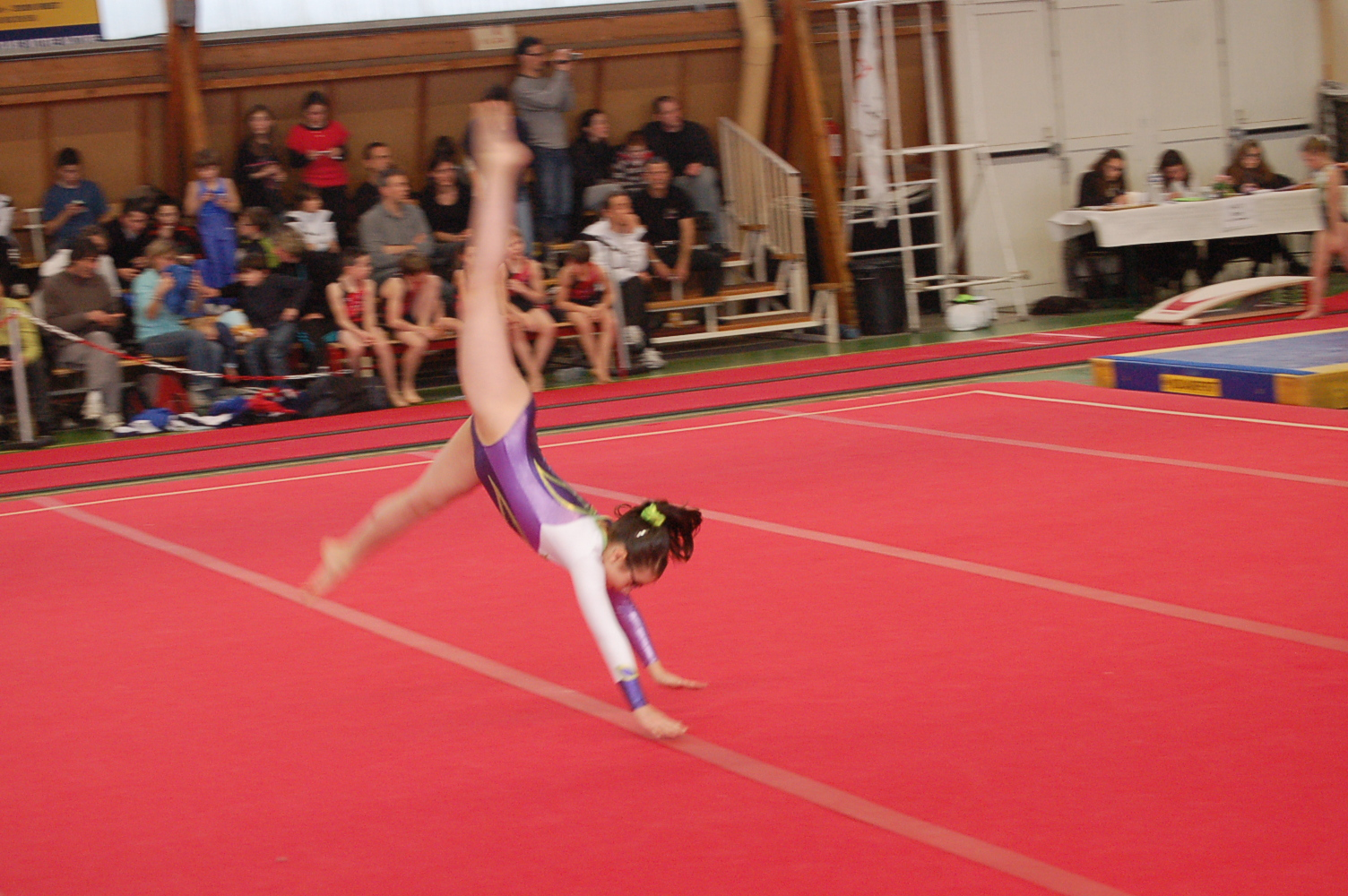 départ de saut de main ( passage par l'atr)